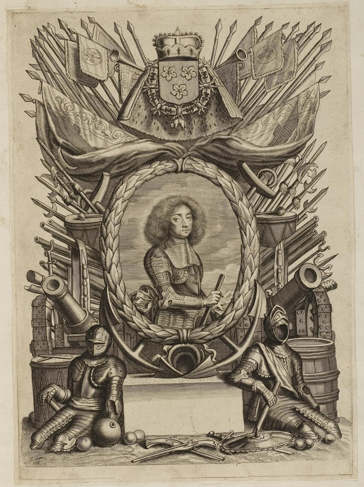 Grafik aus dem Klebeband Nr. 1 der Fürstlich Waldeckschen Hofbibliothek Arolsen Motiv: Karl Eugen von Arenberg, Ritter des Ordens vom Goldenen Vlieses